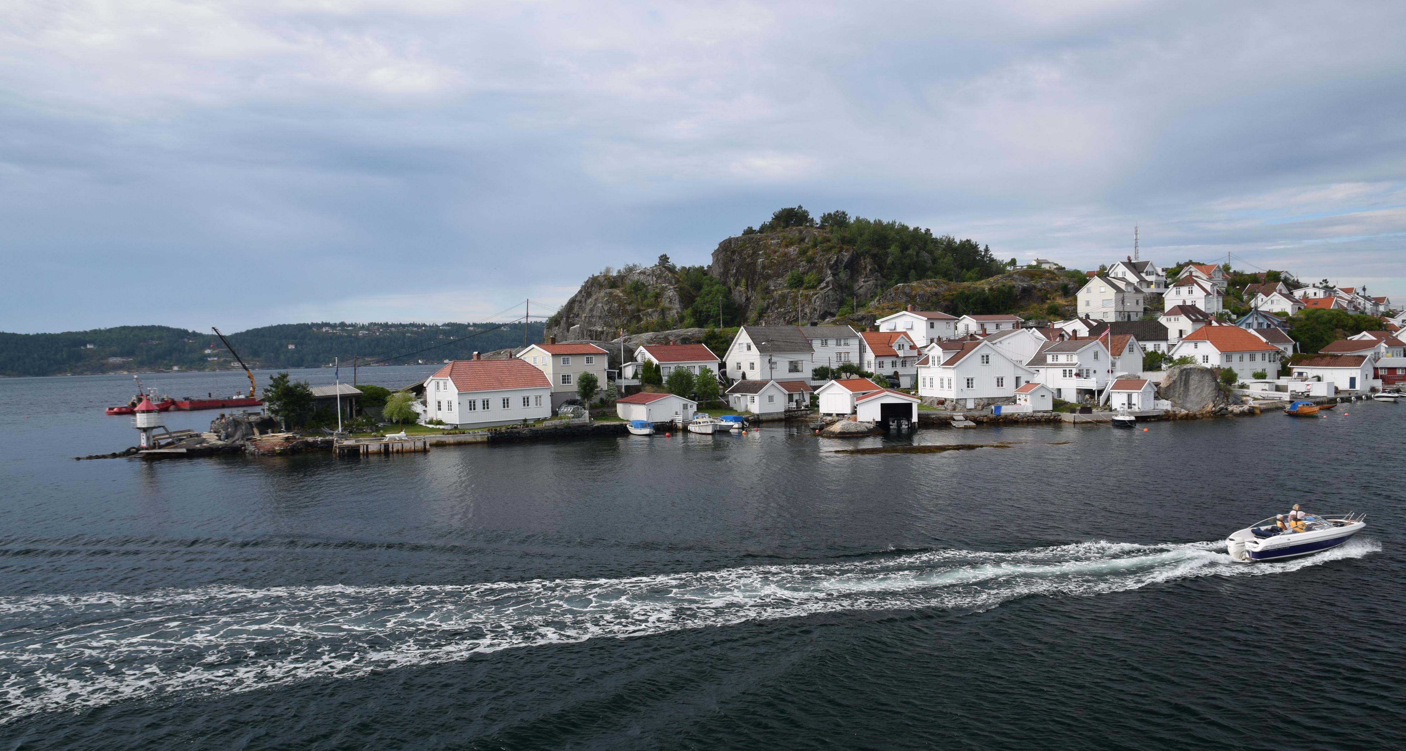 Galeiodden, øst på Øya i Kragerø, som ligger rett sørøst for sentrum